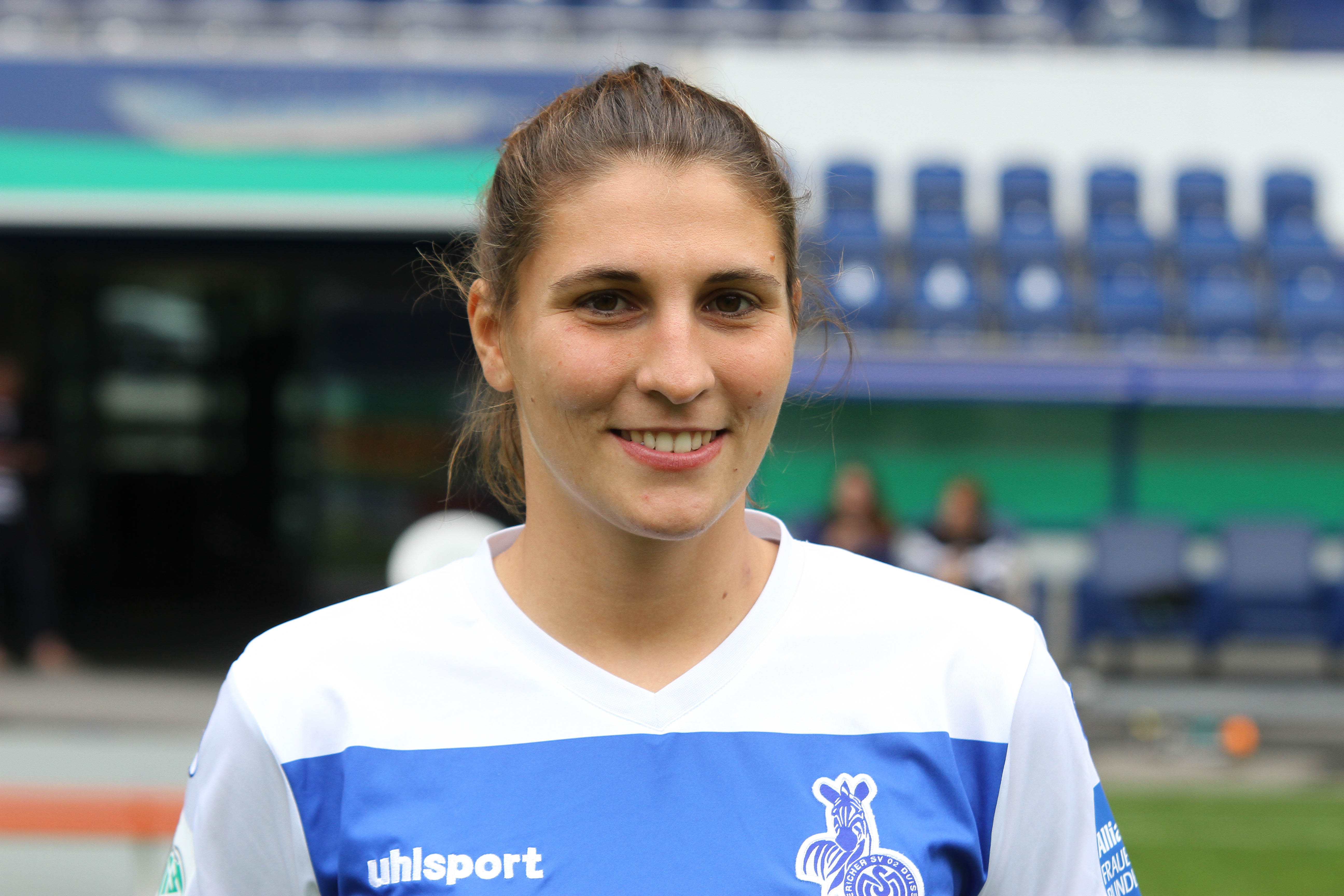 Laura Neboli (2014)